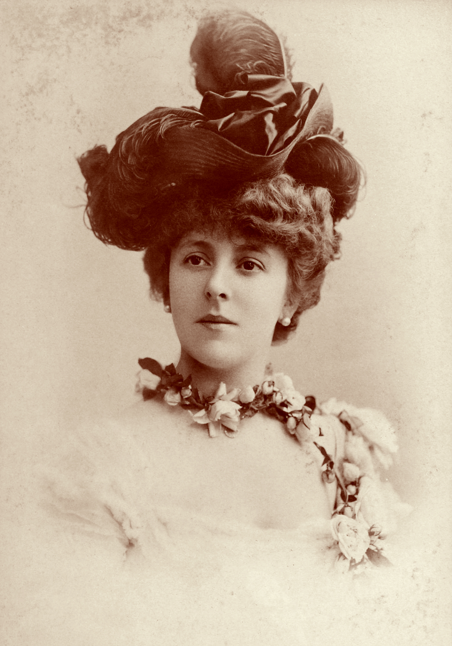 Album Reutlinger de portraits divers, vol. 2. Émilienne d'Alençon.